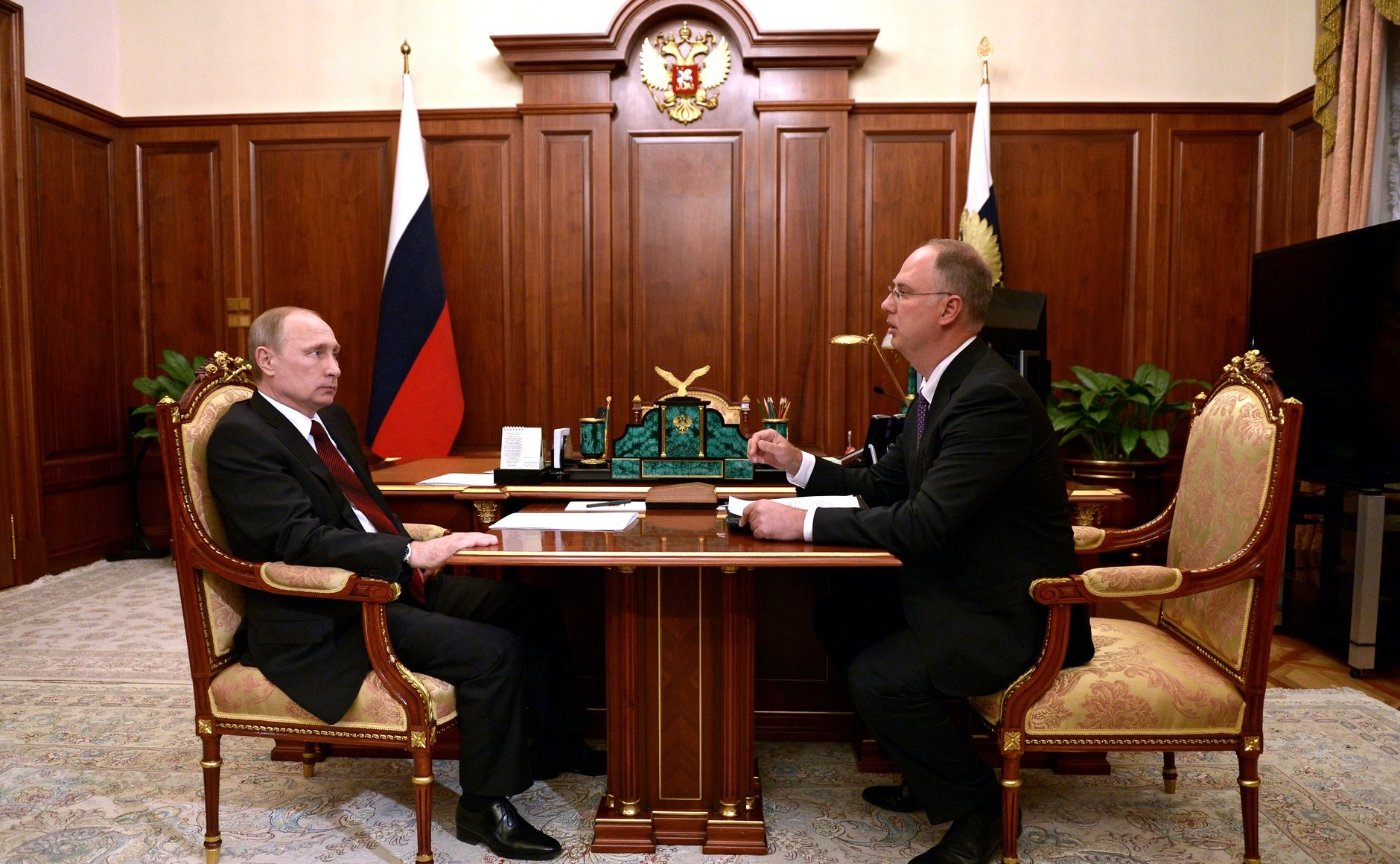 Владимир Путин и Кирилл Дмитриев